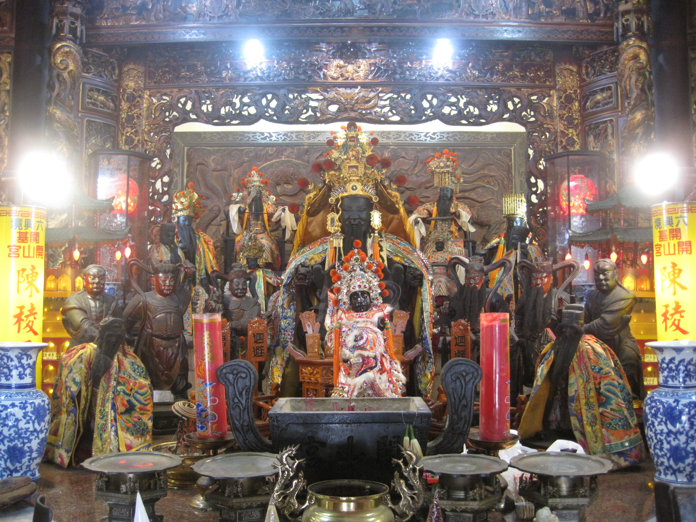 開基開山宮正殿